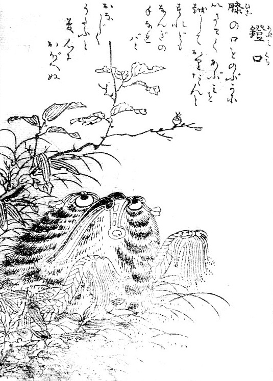 Abumi-guchi (鐙口) from the Gazu Hyakki Tsurezure Bukuro (百器徒然袋)